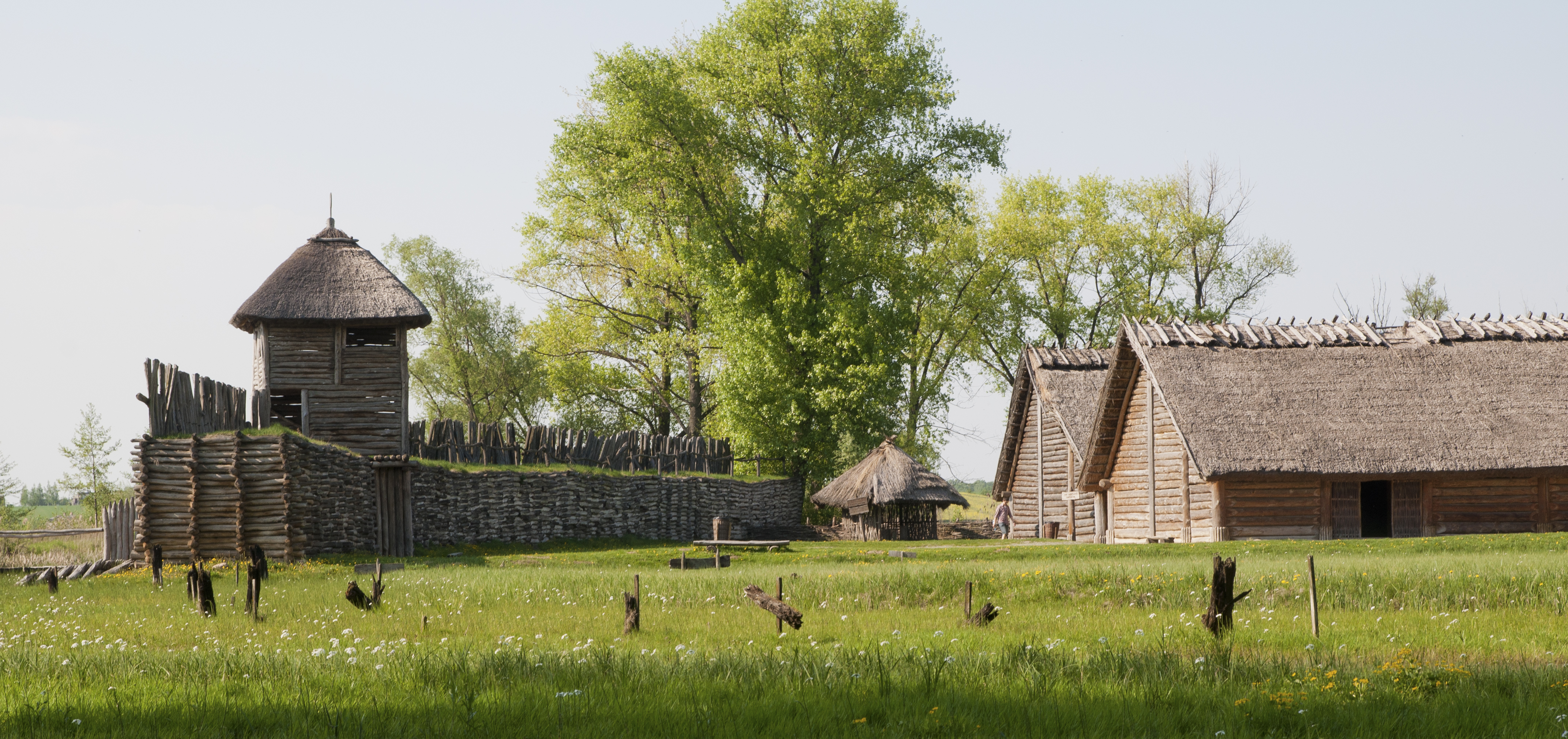 Biskupin